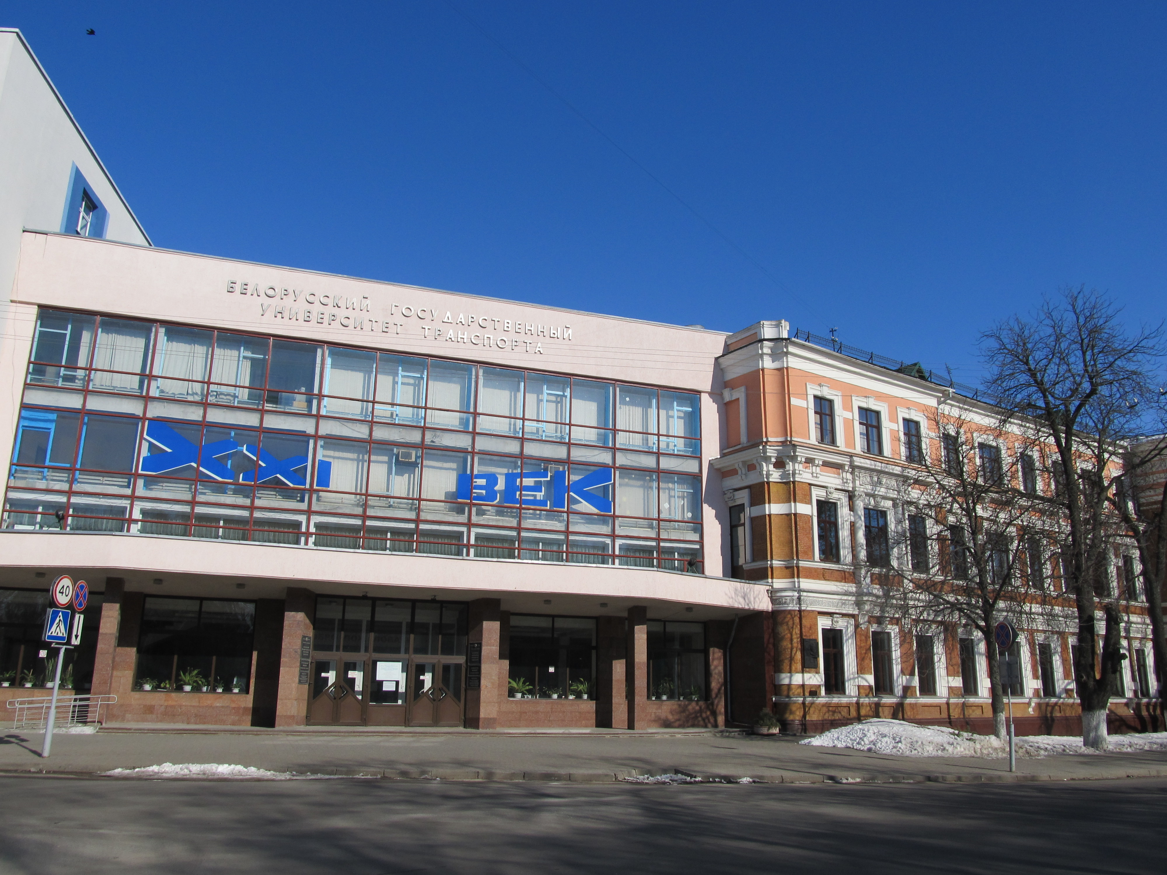 Беларуская (тарашкевіца): Будынак былой мужчынскай гімназіі. г. Гомель This is a photo of Belarusian heritage monument. Reference number: 312Г000039 ( WLM)